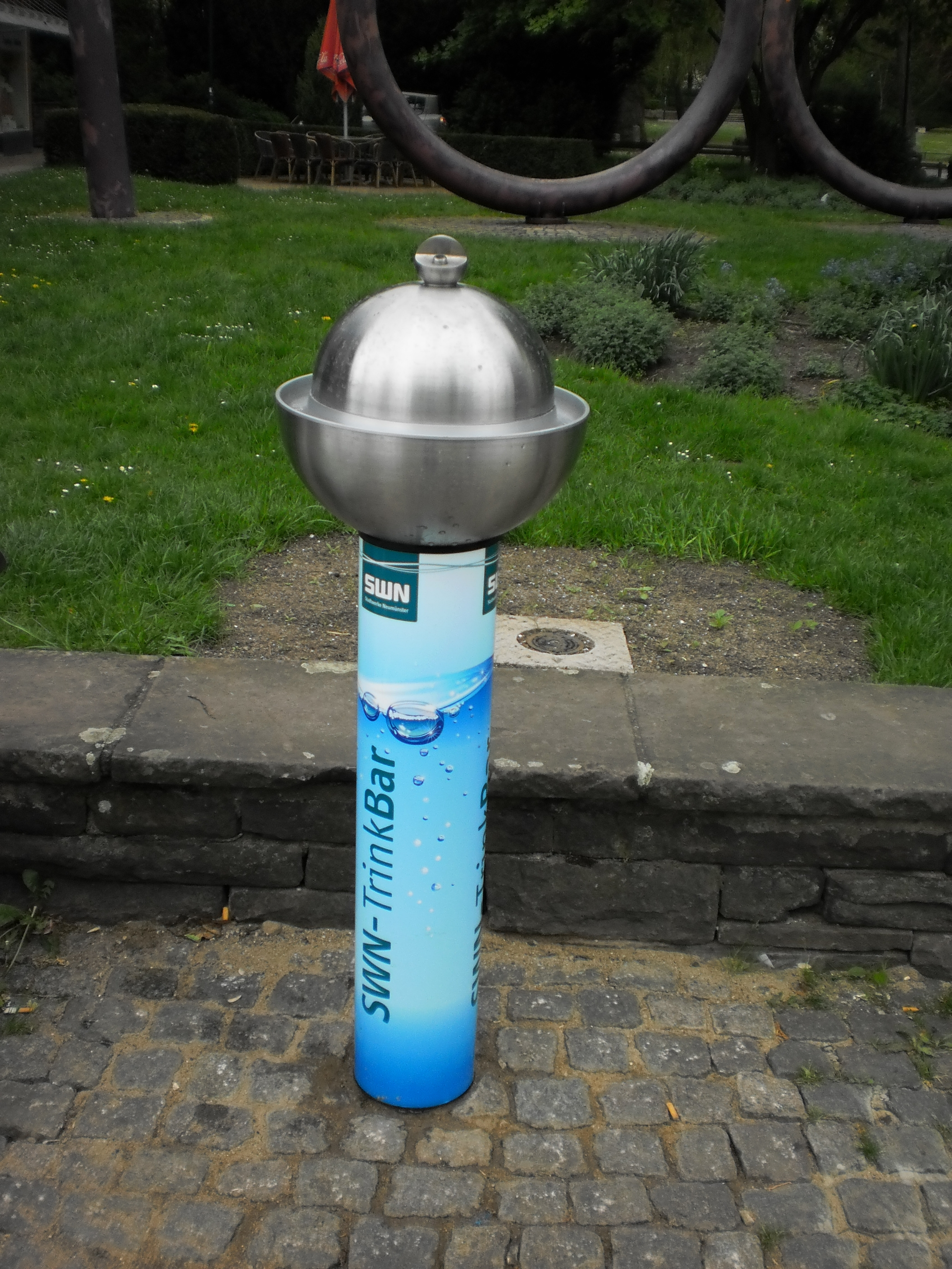 Erster öffentlicher Trinkbrunnen in NMS am 14.Mai eröffnet